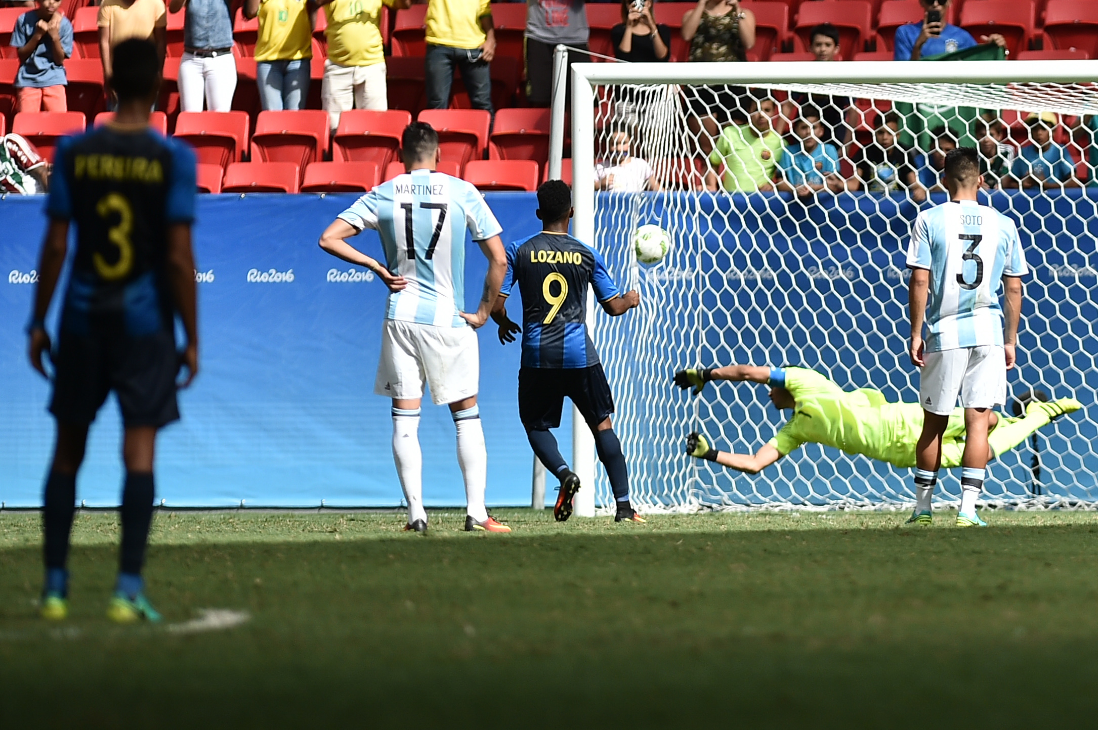 Partido entre Argentina y Honduras por fase de grupos, Estádio Nacional de Brasília Mané Garrincha, Brasília, DF, Brasil, 10/8/2016. Pênalti anotado pelo Anthony Lozano (9). Honduras 1 x Argentina 0. Argentina e Honduras empataram por 1x1 na quarta-feira 10 de agosto, no Estádio Mané Garrincha, em partida pelo grupo D do futebol masculino nas Olimpíadas 2016. O placar classificou Honduras para a próxima fase da competição e tirou a seleção argentina masculina da Olimpíada.